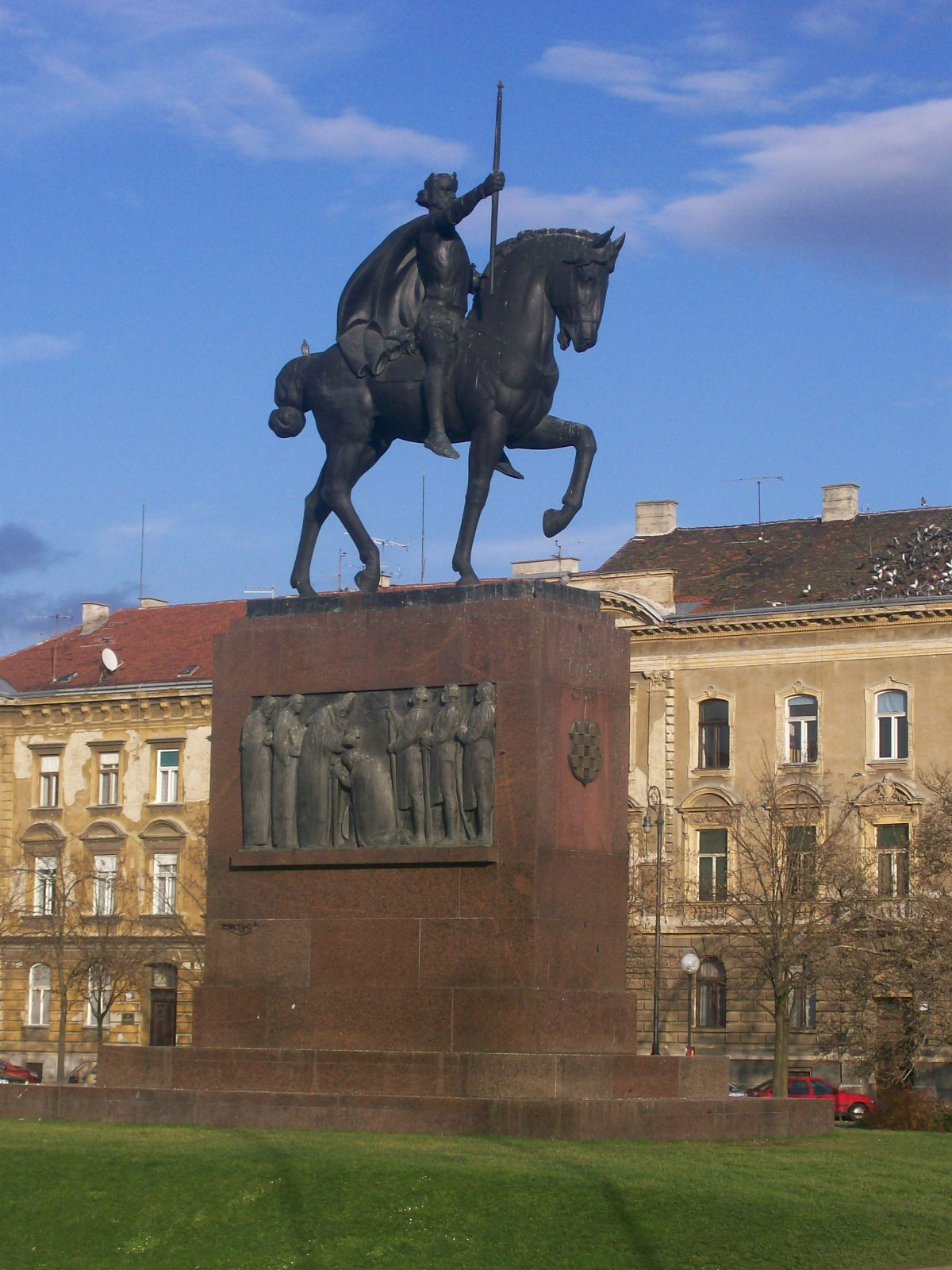 Spomenik kralju Tomislavu